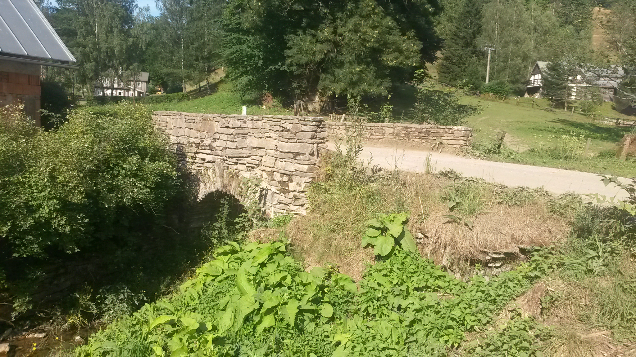 Dolní Lycečiny most